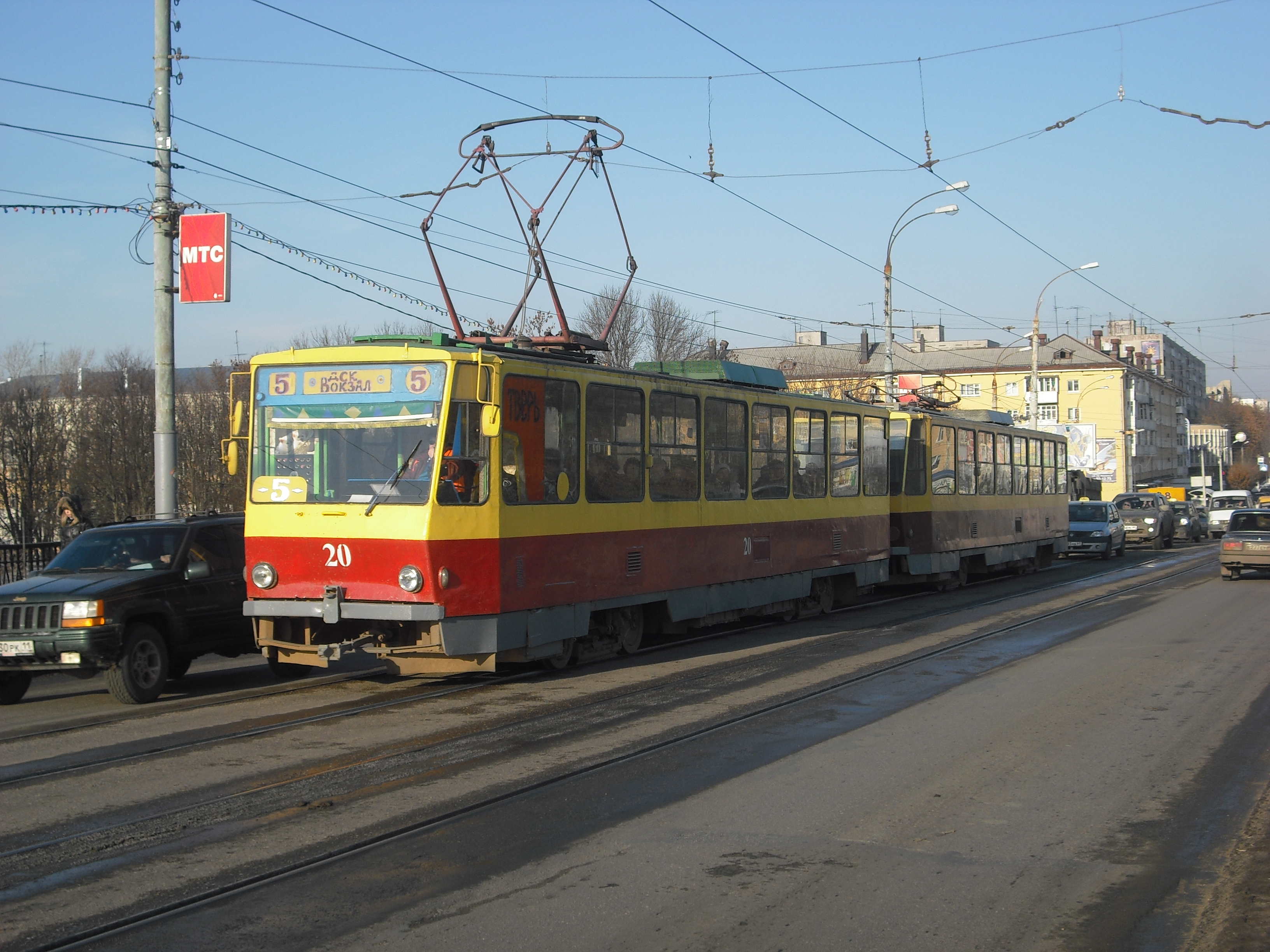 Трамвай на Новом мосту в Твери